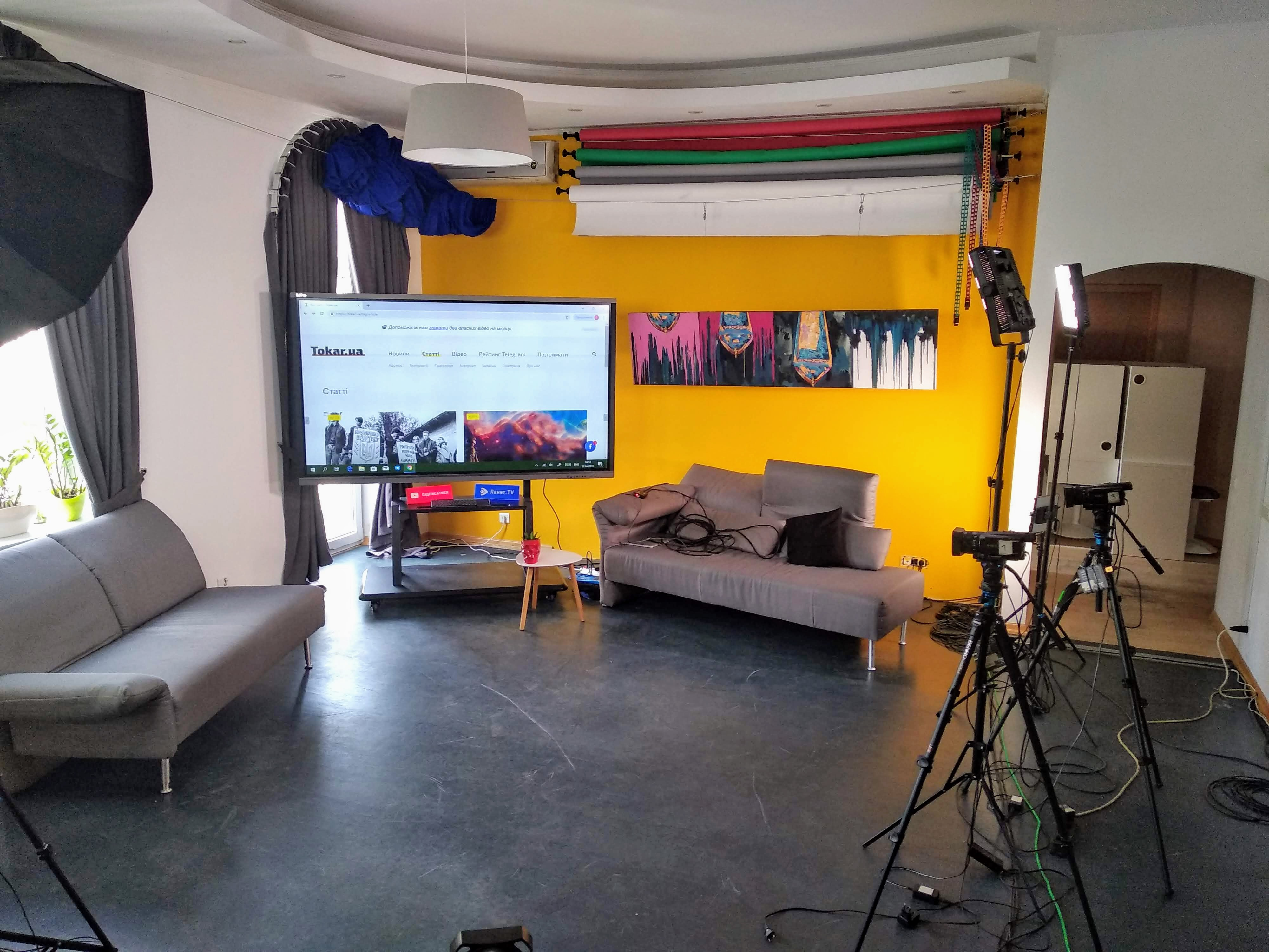 Студія skrypin.ua перед записом